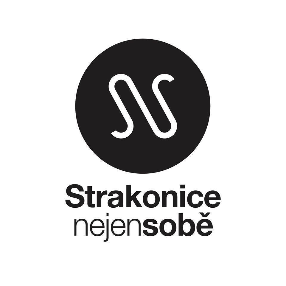 Logo festivalu Strakonice nejen sobě